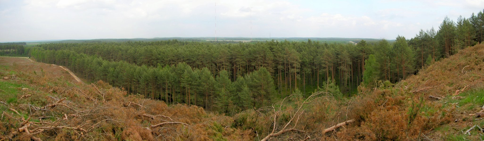 Puszcza Bydgoska - widok ze szczytu wydmy śródlądowej